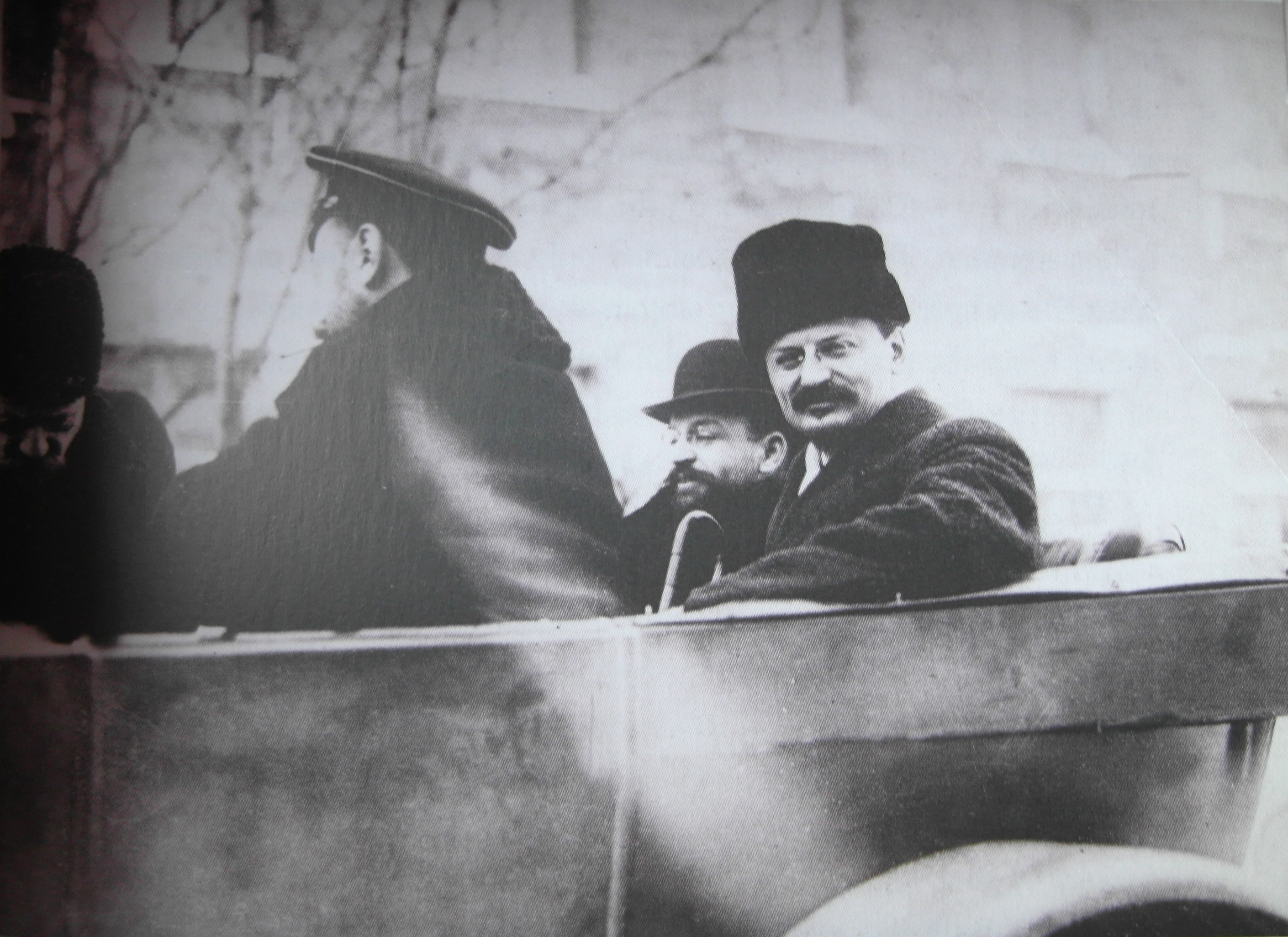 Adolf Joffe y León Trotski en Brest-Litovsk en noviembre de 1917.